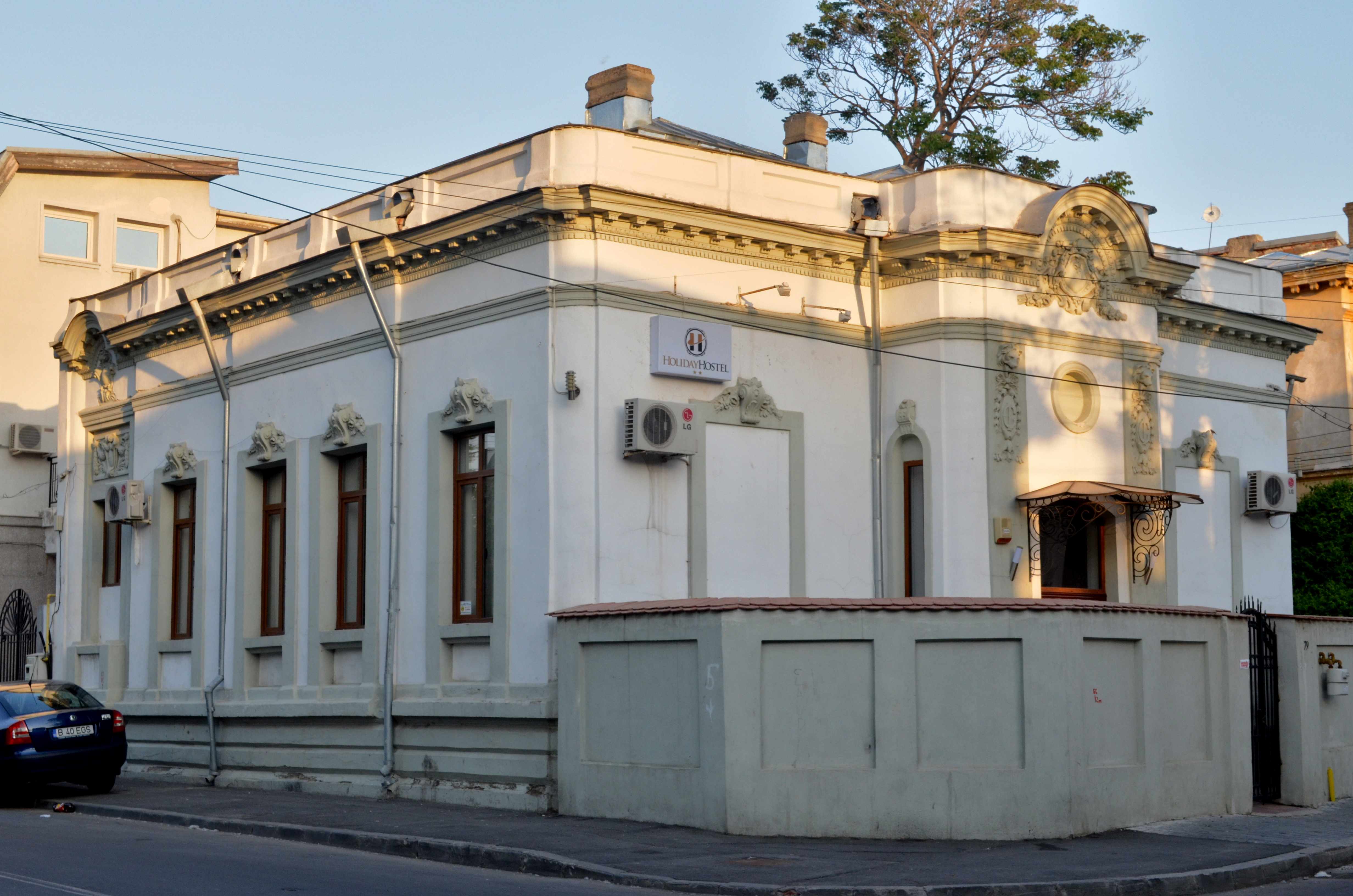 Casă, Strada Romulus nr. 79, Sector 3, București